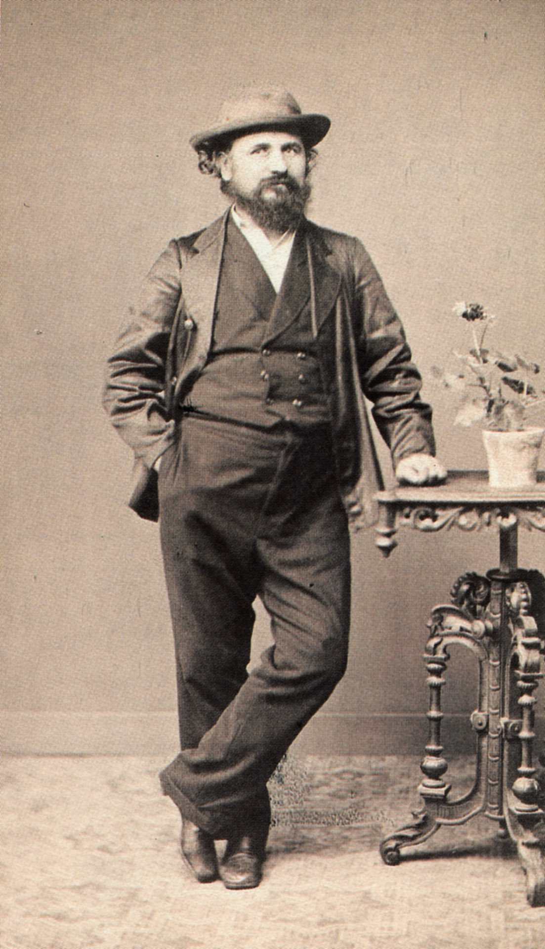 autoportrét Josefa Woldana